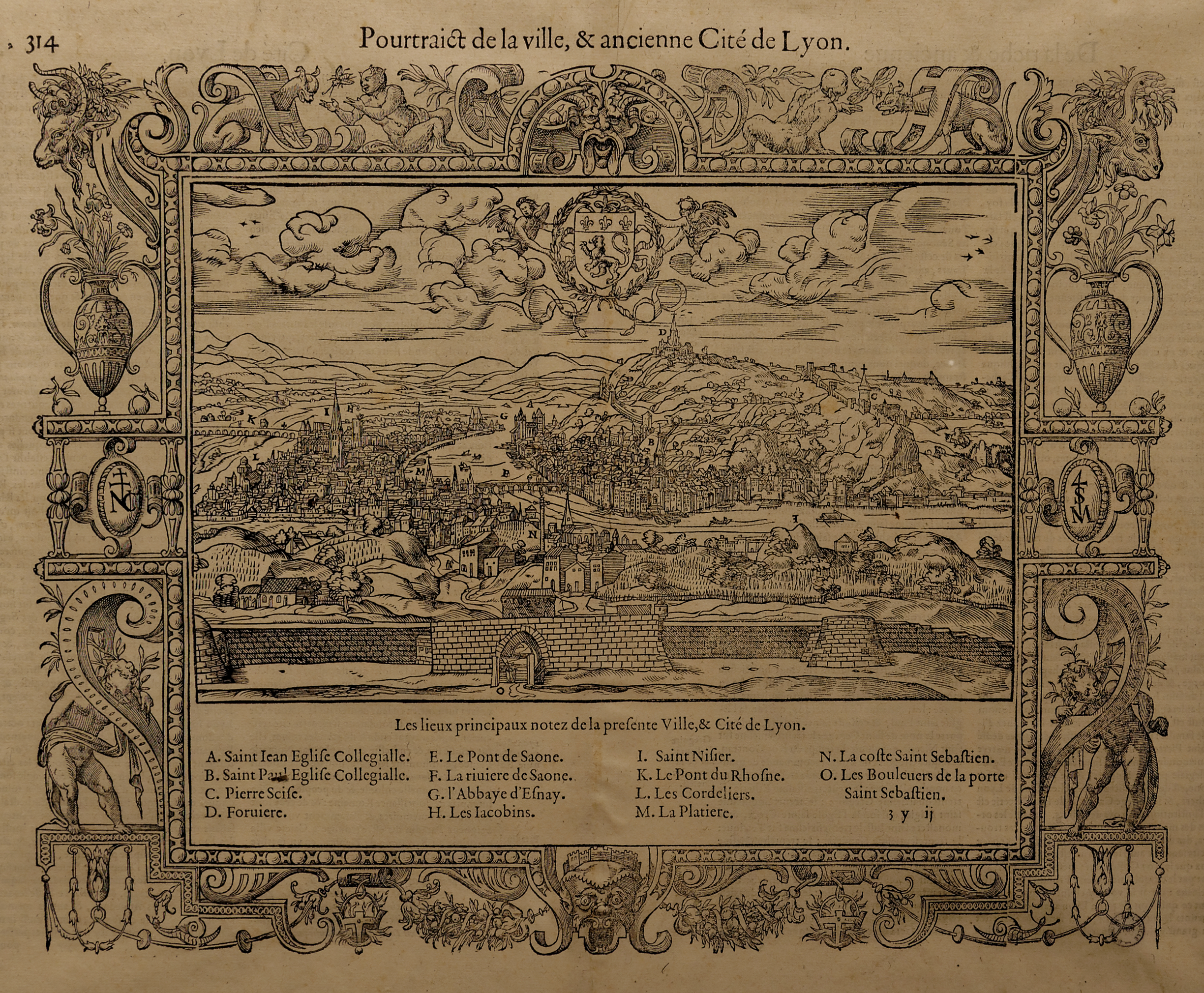 Estampe d'Antoine du Pinet publiée dans l'ouvrage de François de Belleforest, La cosmographie universelle de tout le monde ..., Paris, Nicolas Chesneau et Michel Sonnius, 1575. Lyon, Bibliothèque Municipale de Lyon, Coste 213. Présentée lors de l'exposition : Lyon Renaissance. Arts et humanisme. Cat 5